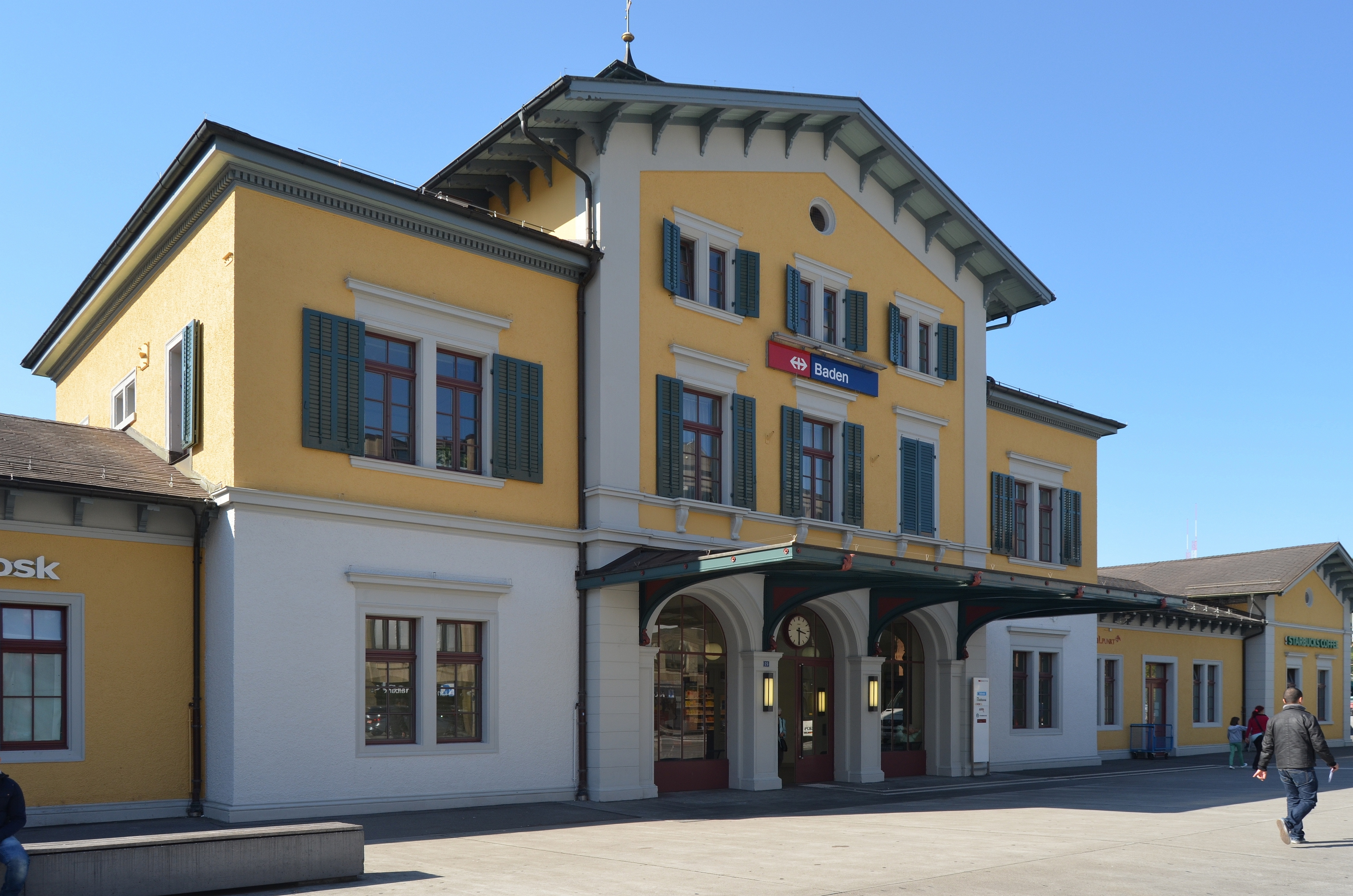 Bahnhof Baden, KGS_Nr = 37, 25 Bahnhofstrasse, Baden (AG), 665.520 / 258.767. Kategorie: A, Objektart: Anlagen für den Verkehr, Bahnhof, Bahnhoefe. Koordinaten N 47.47641 E 8.30777.